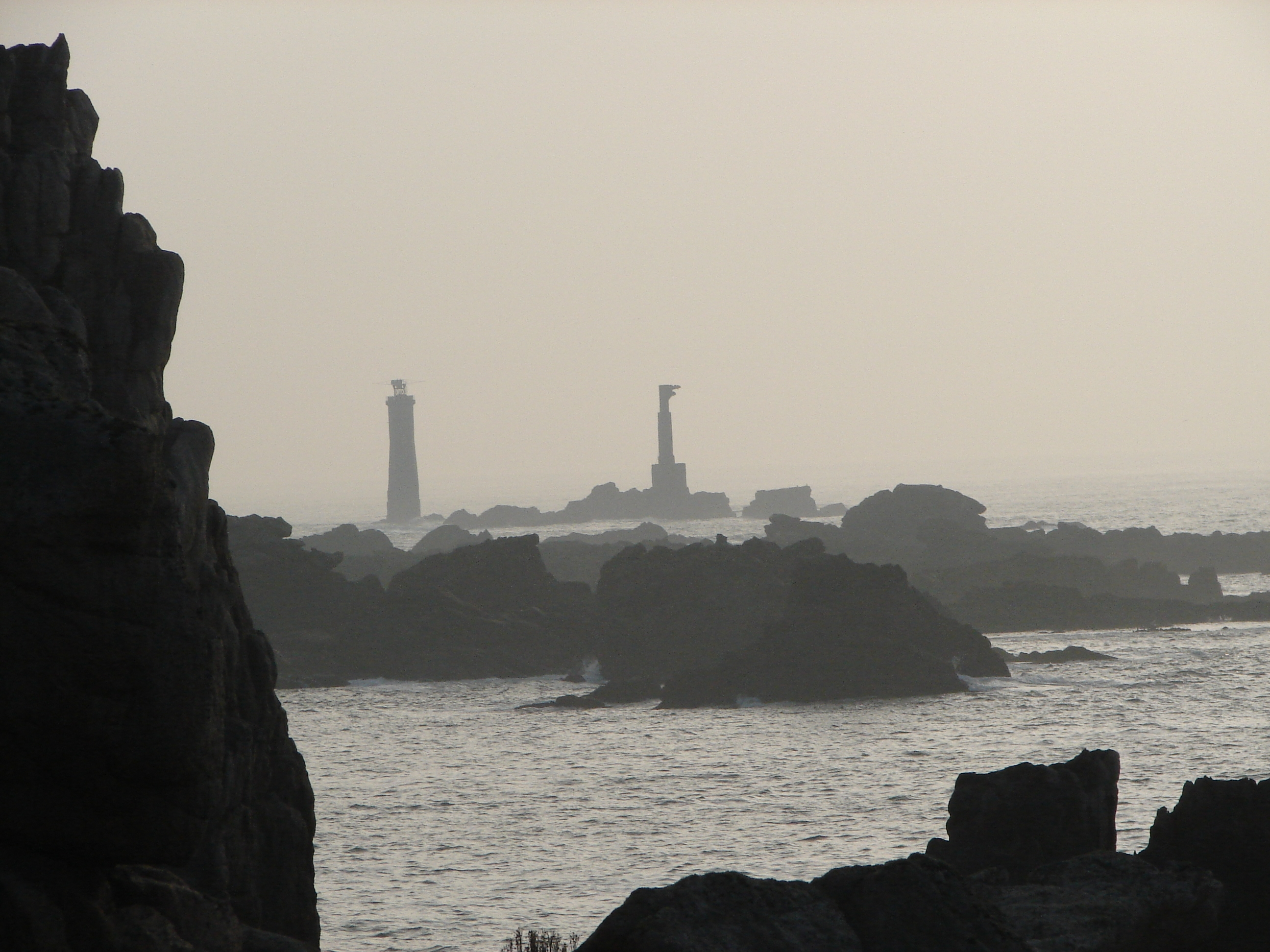 Lieu : Île d'Ouessant (Bretagne/France)